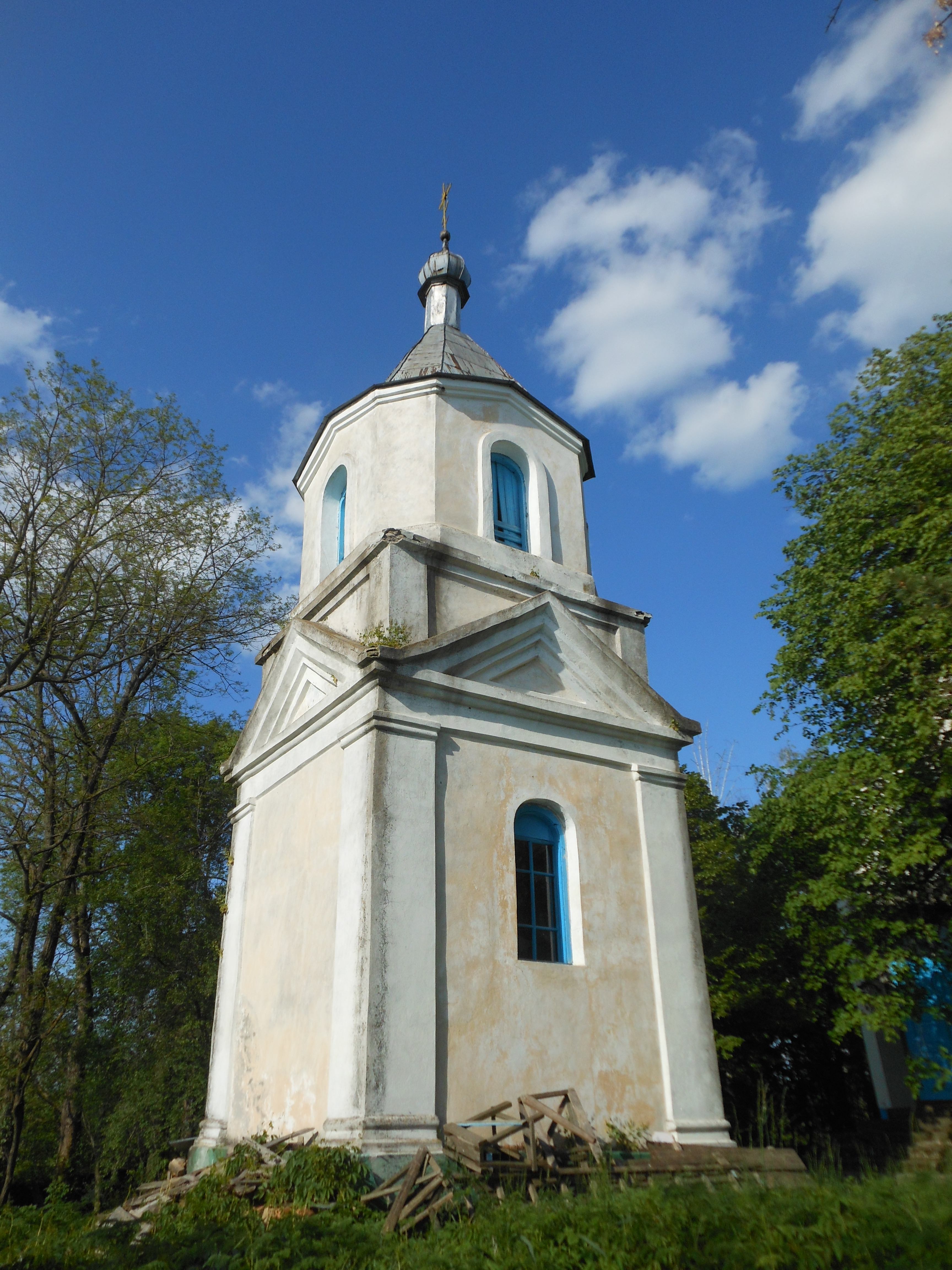 Дзвіниця Миколаївської церкви, Котюжани, вул. Червонопрапорна,2